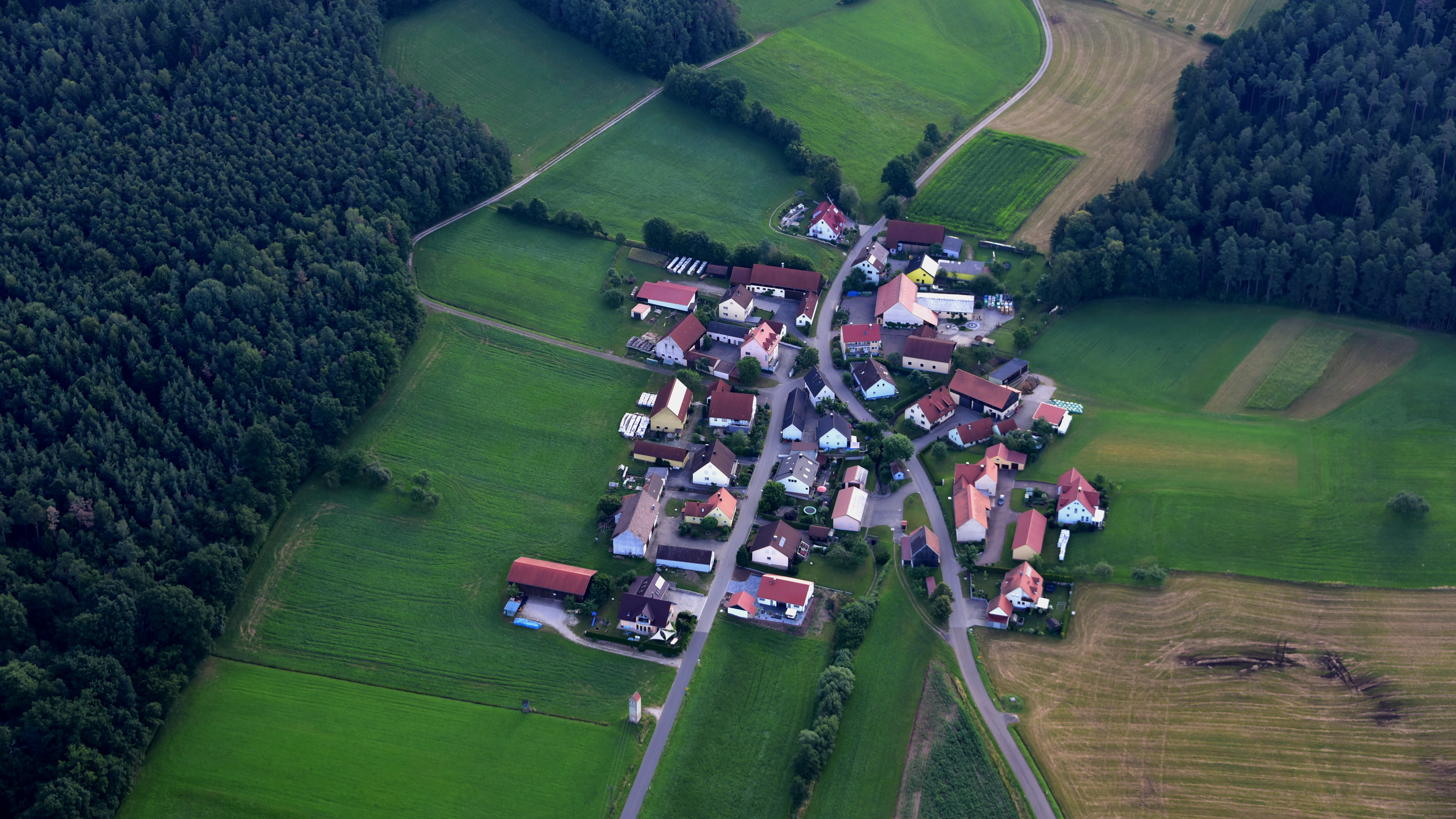 Eppersdorf, Allersberg, Luftaufnahme (2016)